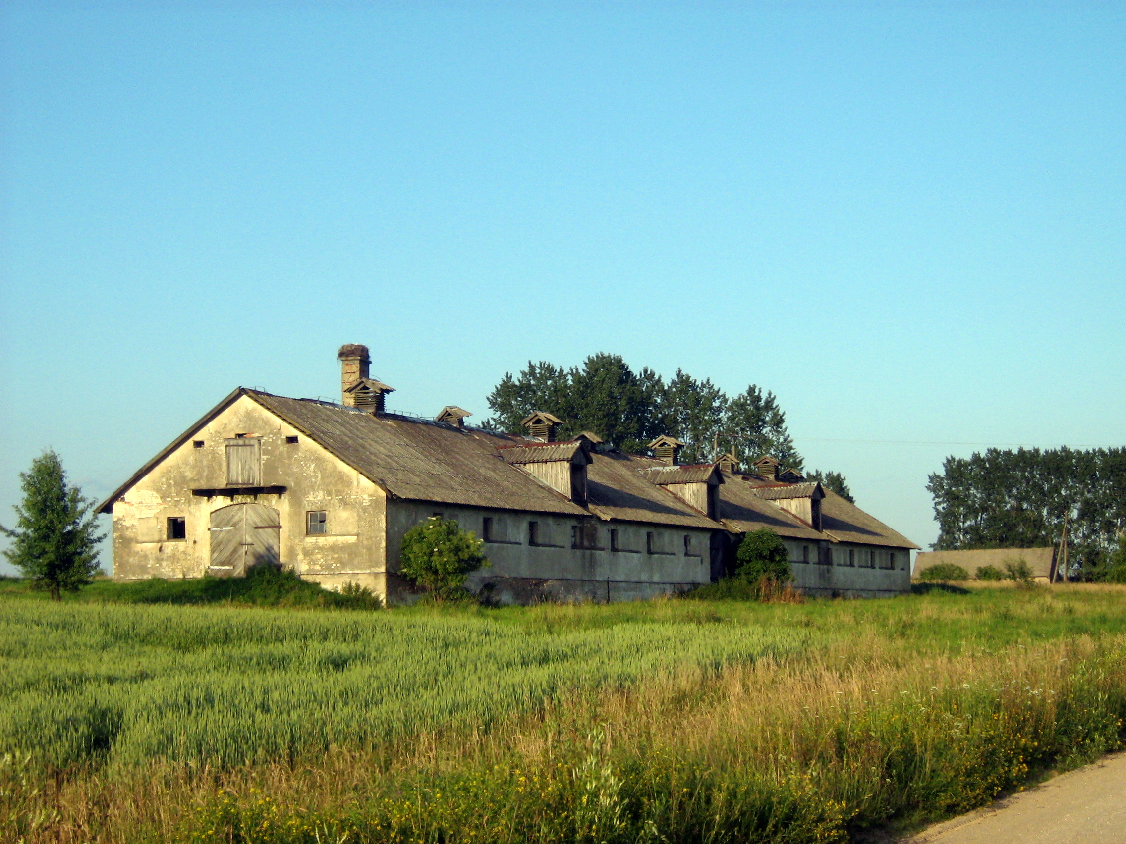 dawny PGR w Wieżance.